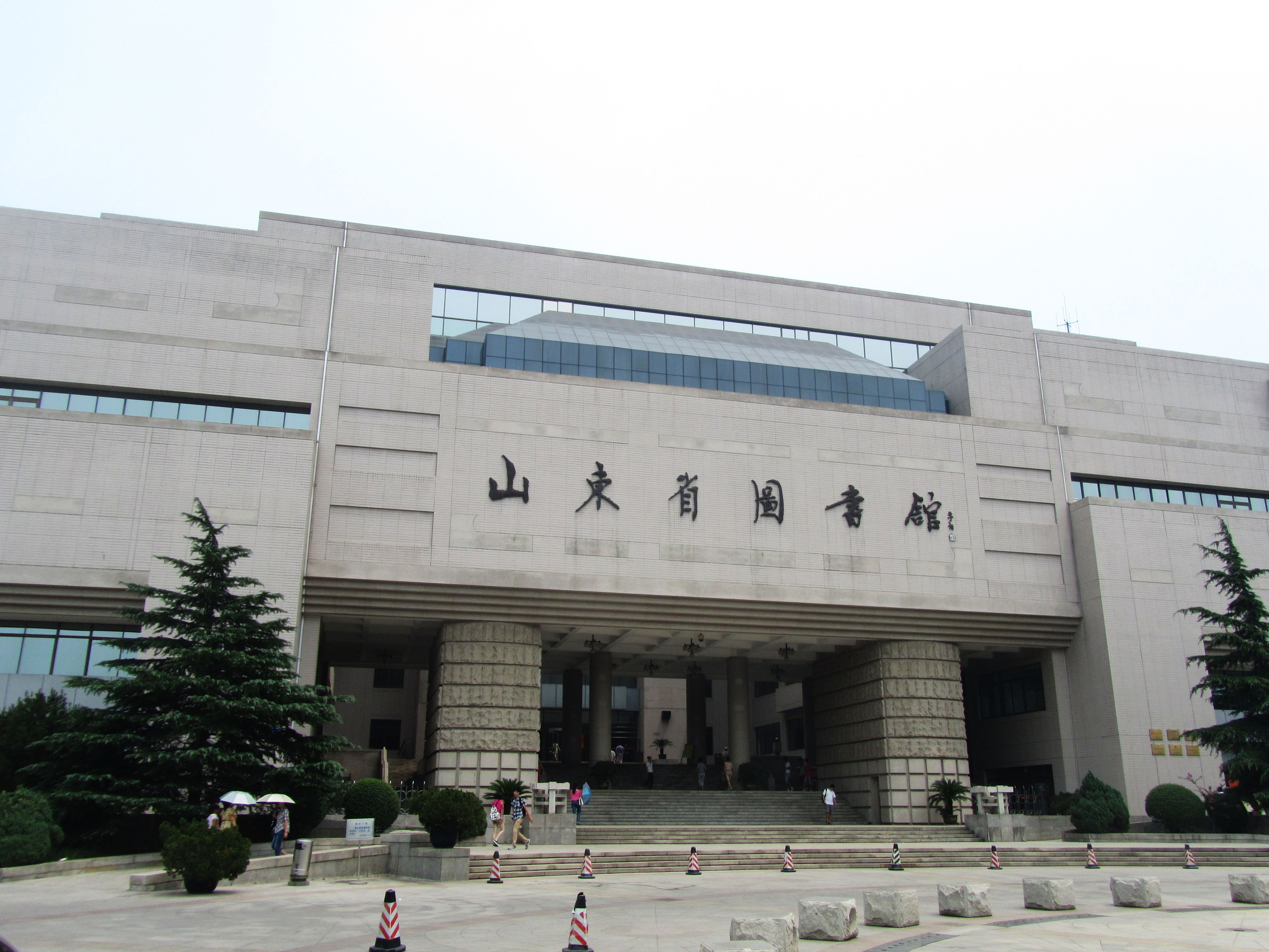 山东省图书馆外景。